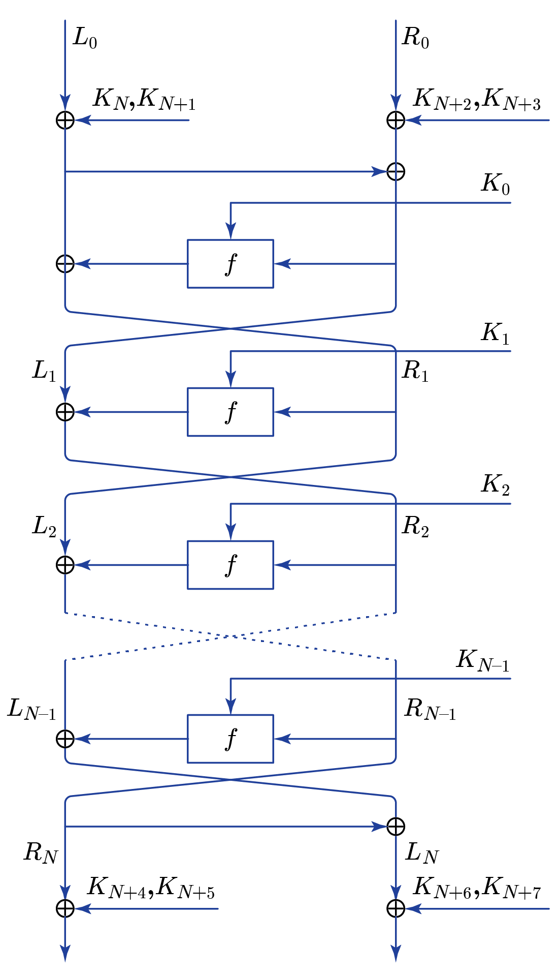 תיאור סכמתי של צופן FEAL